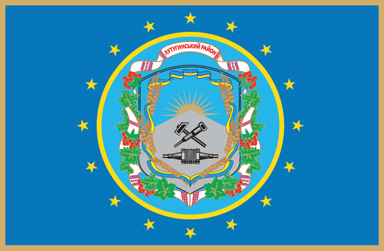 Прапор Лутугинського району